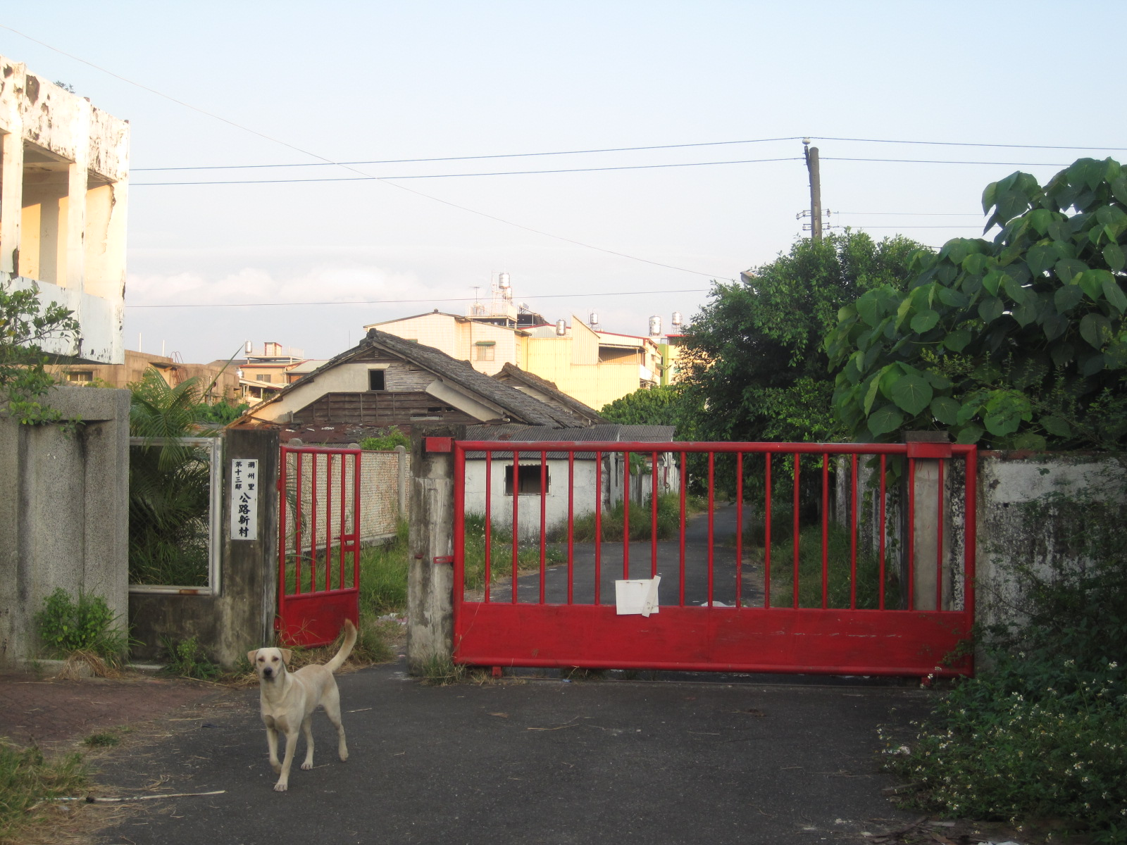 屏東潮州鎮公路新村